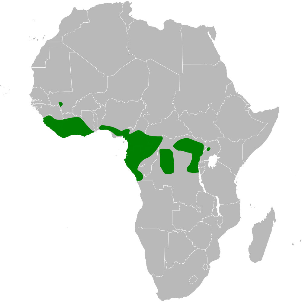 Erythrocercus mccallii distribution map, based on